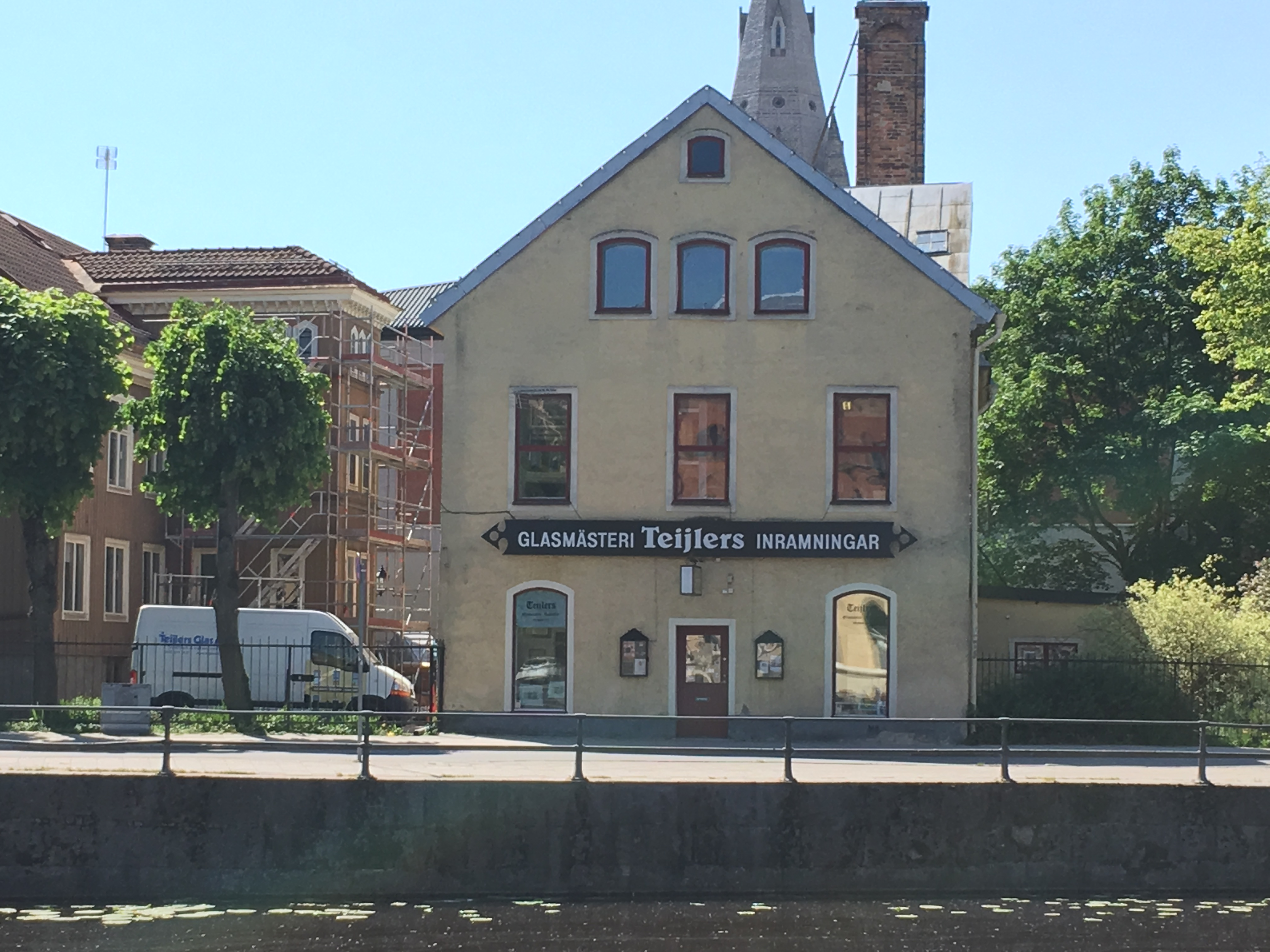 Södra strandgata 1